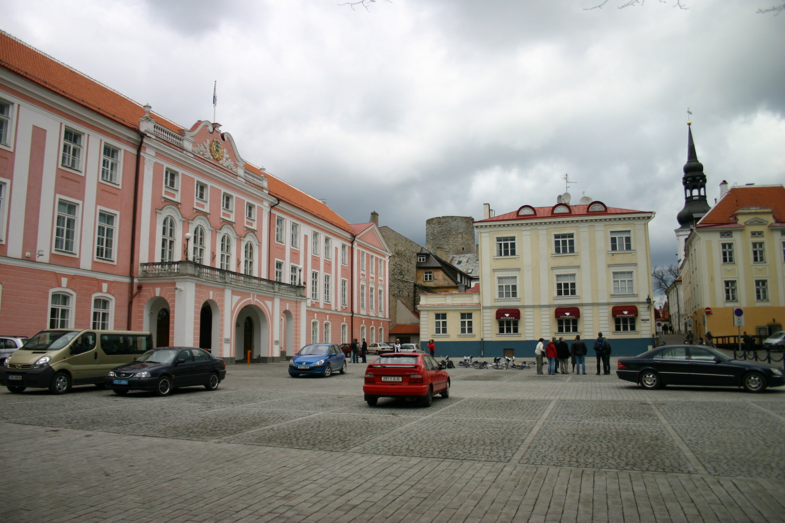 Toompea loss, Sitz des Riigikogu.